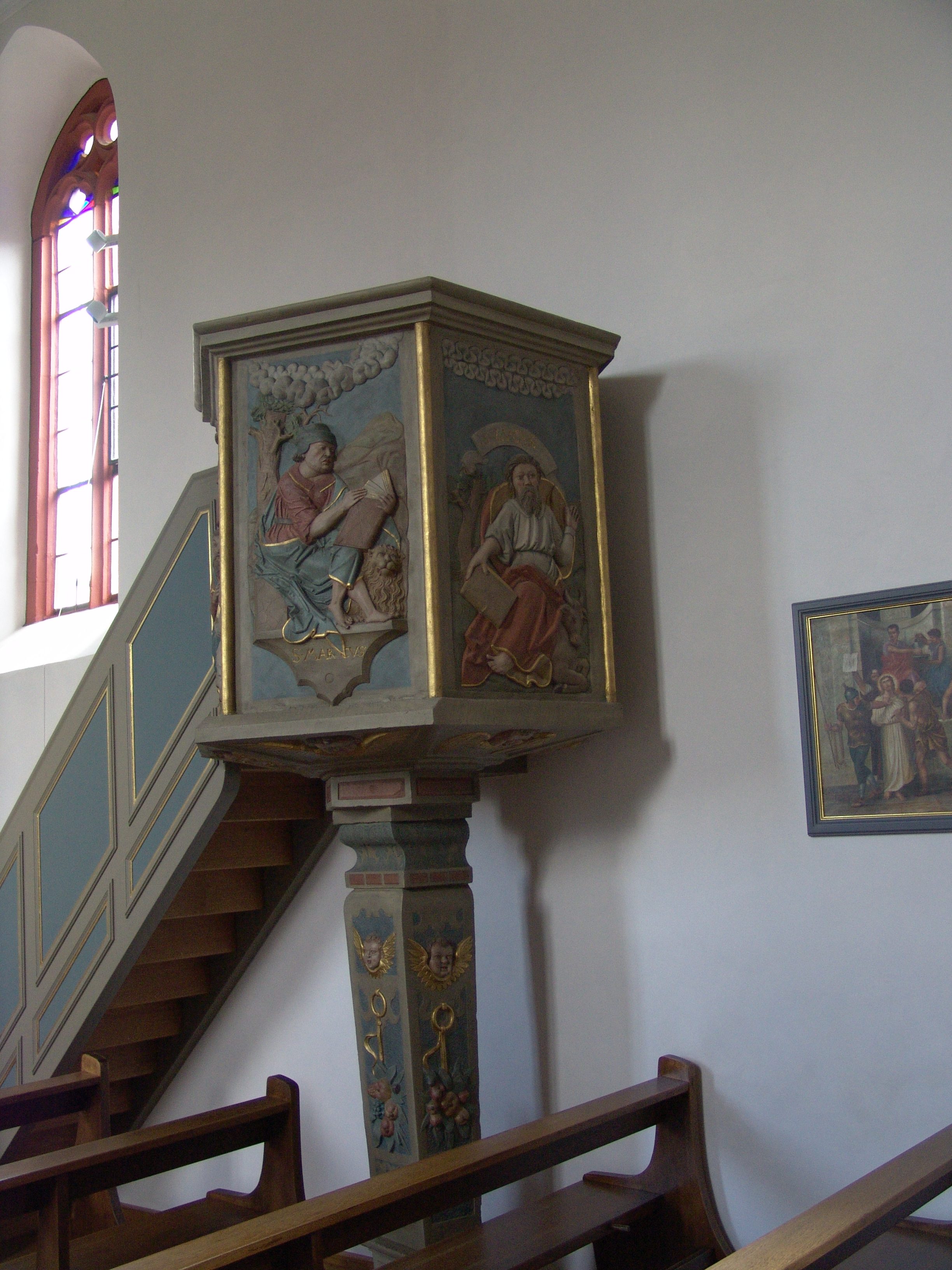 Mainsondheim Pfarrkirche BMV